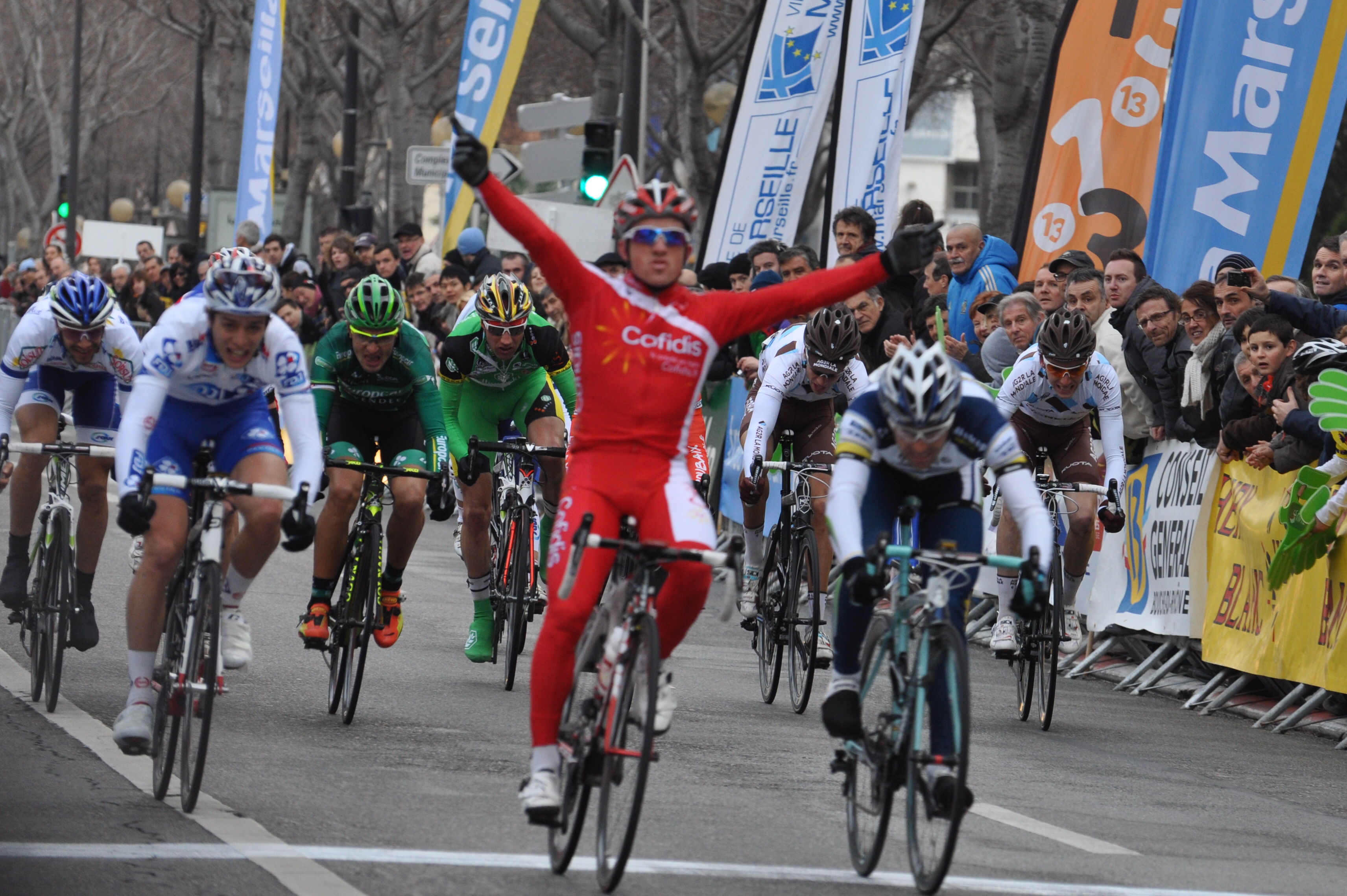 CSC_1356